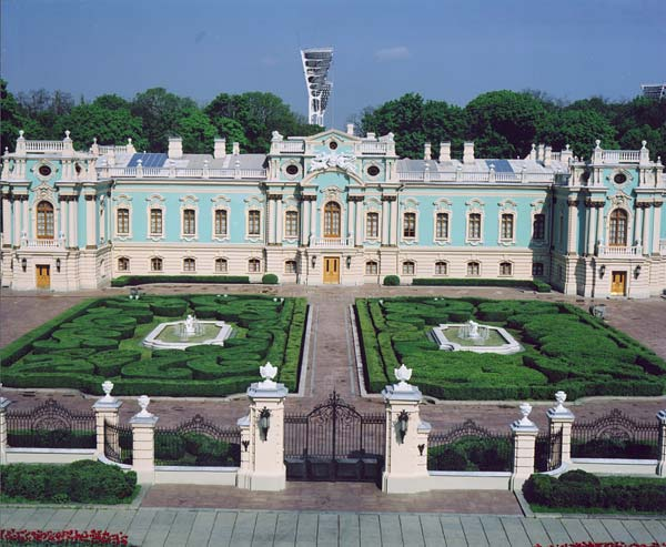 Маріїнський палац. Загальний вид Маріїнського палацу